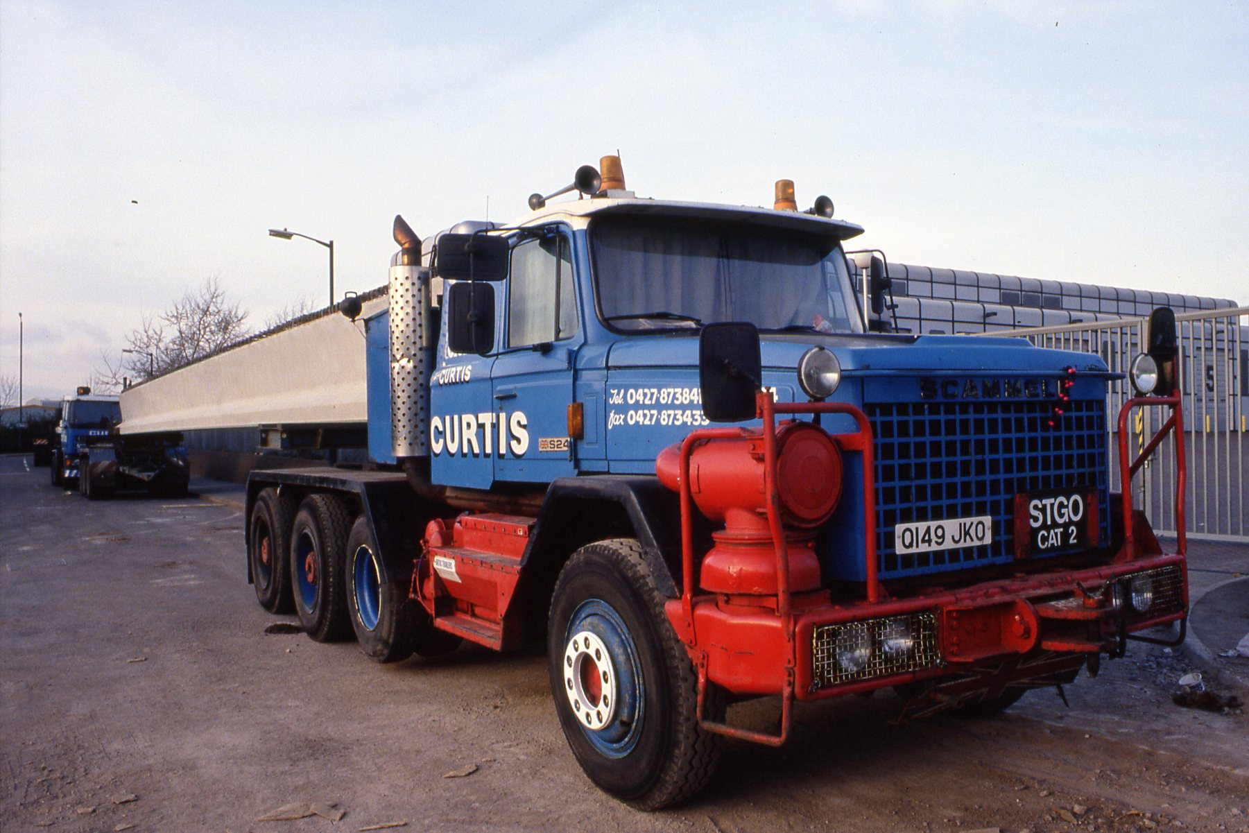 Scan from 35mm slide.